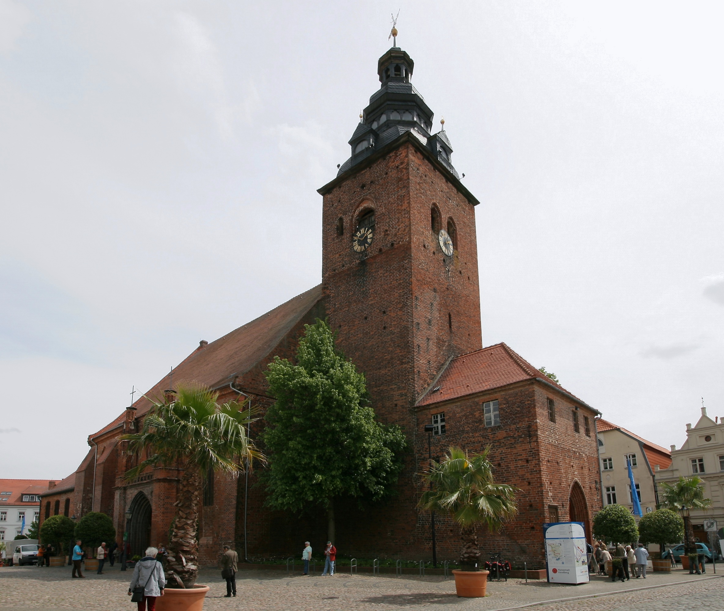 Stadtkirche St. Laurentius in Havelberg, Kirchplatz. Denkmal-ID 094 98191 000 000 000 000.